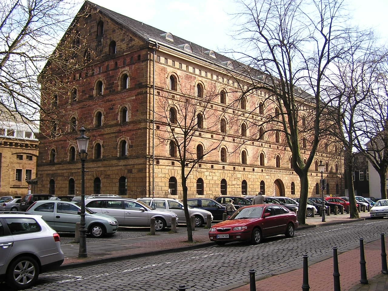 Das Proviant-Magazin in Minden, Nordrhein-Westfalen. Das Magazin diente der Versorgung der in Minden stationierten preußischen Truppen und war Teil des Festungskomplexes Festung Minden. Das vierstöckige, neo-romanische Proviant-Magazin (von den Mindenern auch Körnermagazin genannt) wurde von 1835 bis 1836 als Teil der Festung Minden erbaut und umfasst 3.360 Quadratmeter. Das Dachgeschoss ist mit einer Bombenbalkendecke sowie Schneeboden ausgestattet. Die Außenwände sind mit Porta-Sandstein verblendet. In den letzten Kämpfen um Minden im Zweiten Weltkrieg wurde es von deutschen Truppen angesteckt, als diese das linke Weserufer verließen. Es brannte aus und war 30 Jahre eine Ruine. Seit 1975 beherbergt es eine Schule, das Weser-Kolleg.